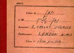 כריכת אחד היומנים של נתן שלם, לונדון 1936